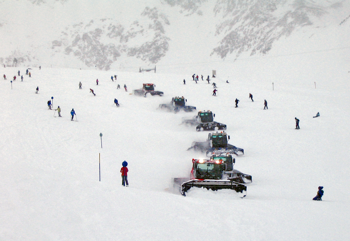 Pistenfahrzeuge zwischen Skifahrern im Konvoi. Von mir aufgenommen im Stubaital. Valentin Dietrich 16:04, 19. Apr 2005 (CEST)